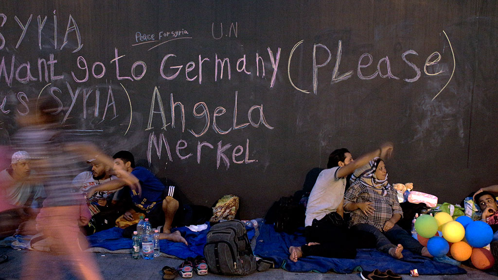 TRANSIT ZONE. Menekültek a Keletinél, Budapest, 2015. szeptember 2-5.